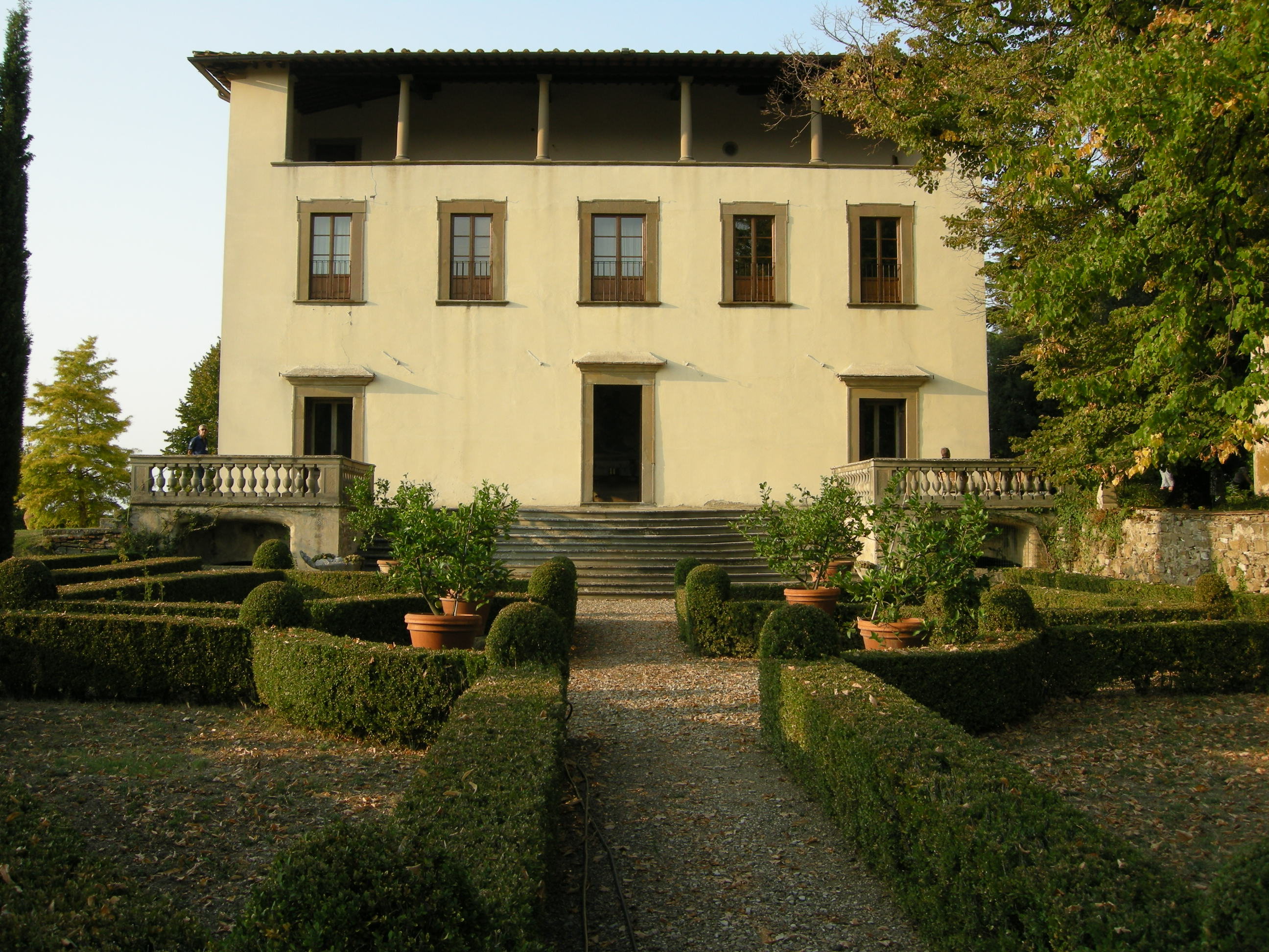 Villa Giogolirossi